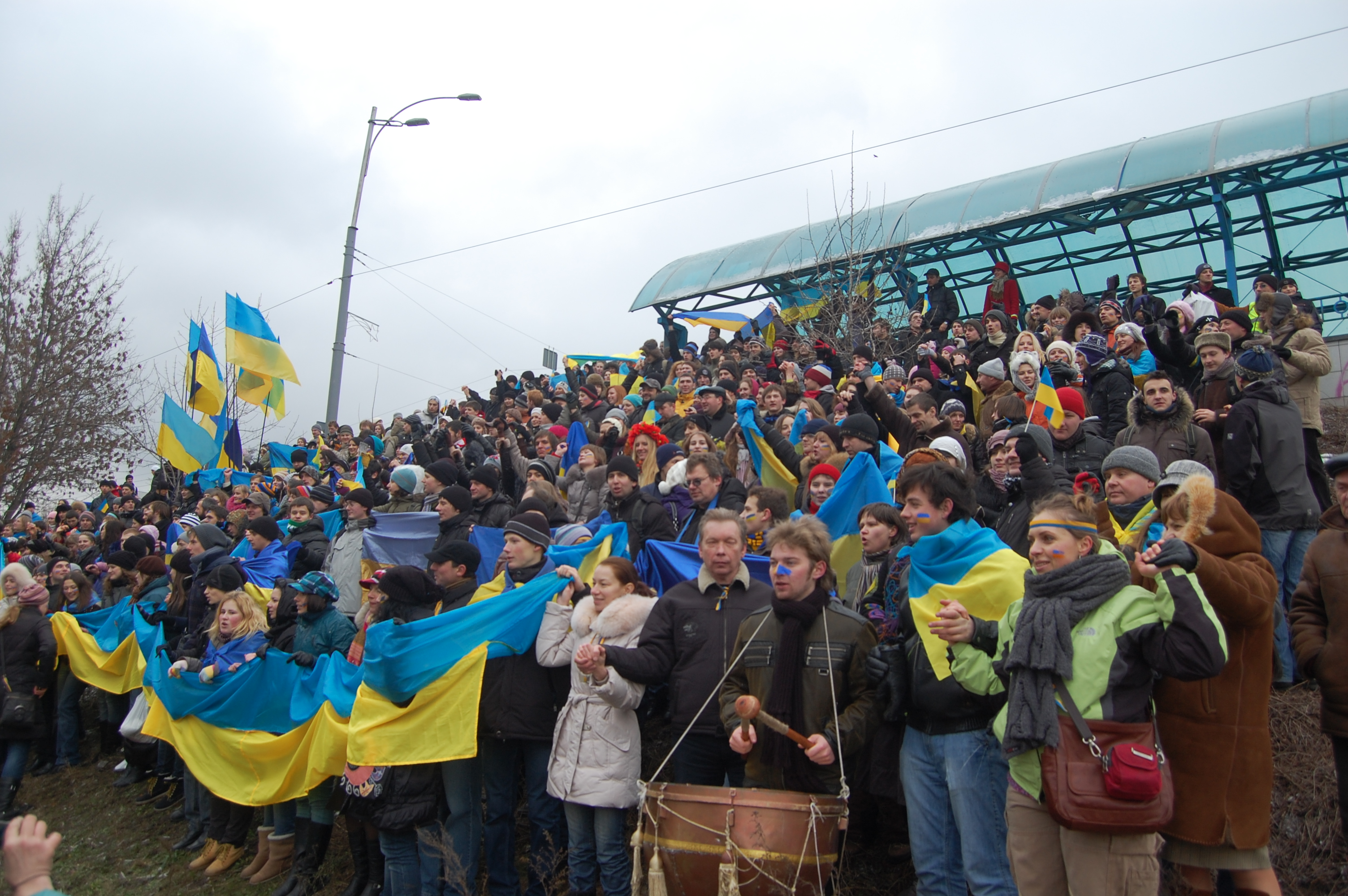 Dzień Jedności Ukrainy 2011